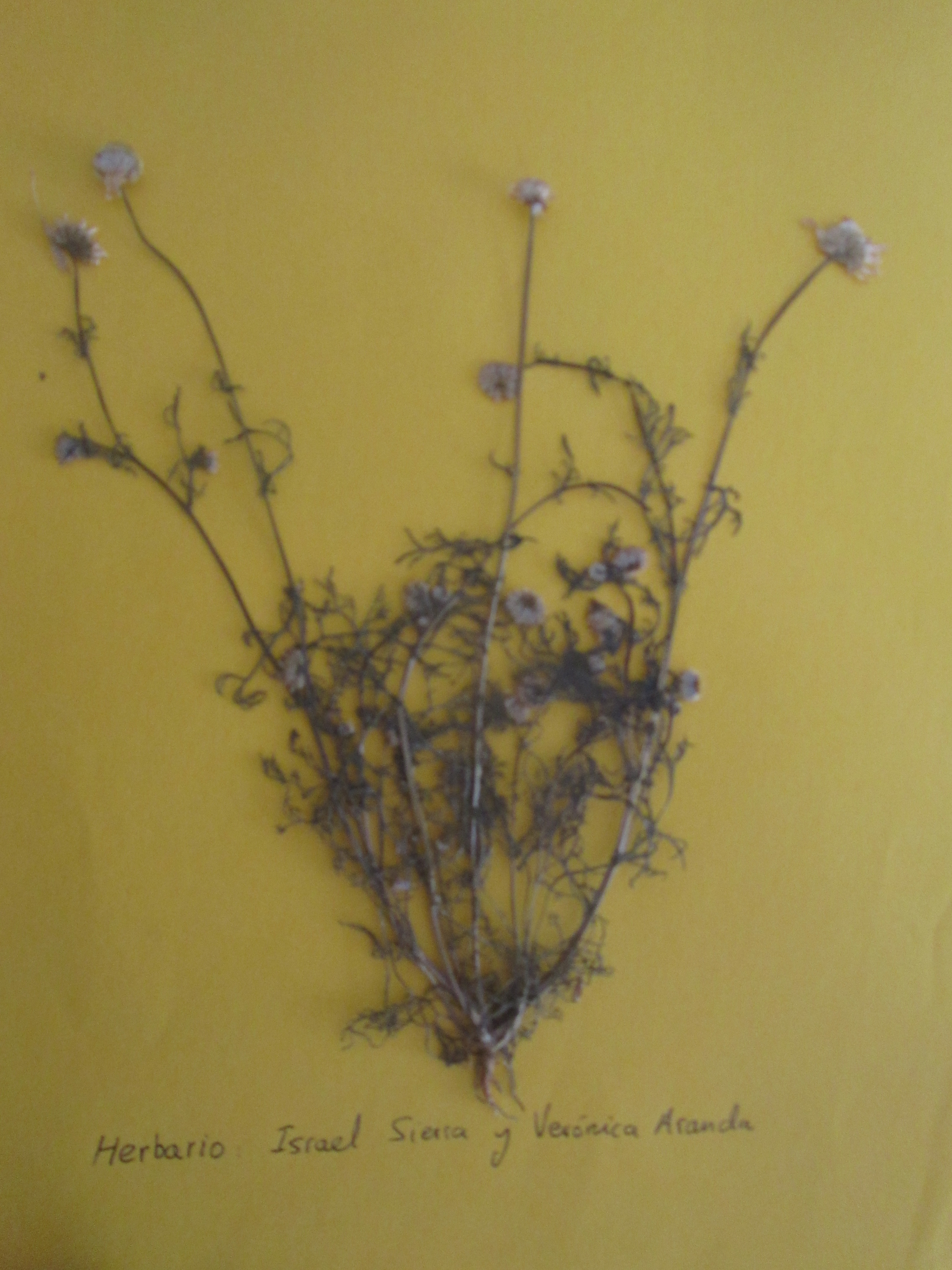 Fotografía extraida del herbario natural realizado por Israel Sierra Rodríguez (Licenciado Ciencias Ambientales) y Verónica Aranda García (Licenciada en Biología)